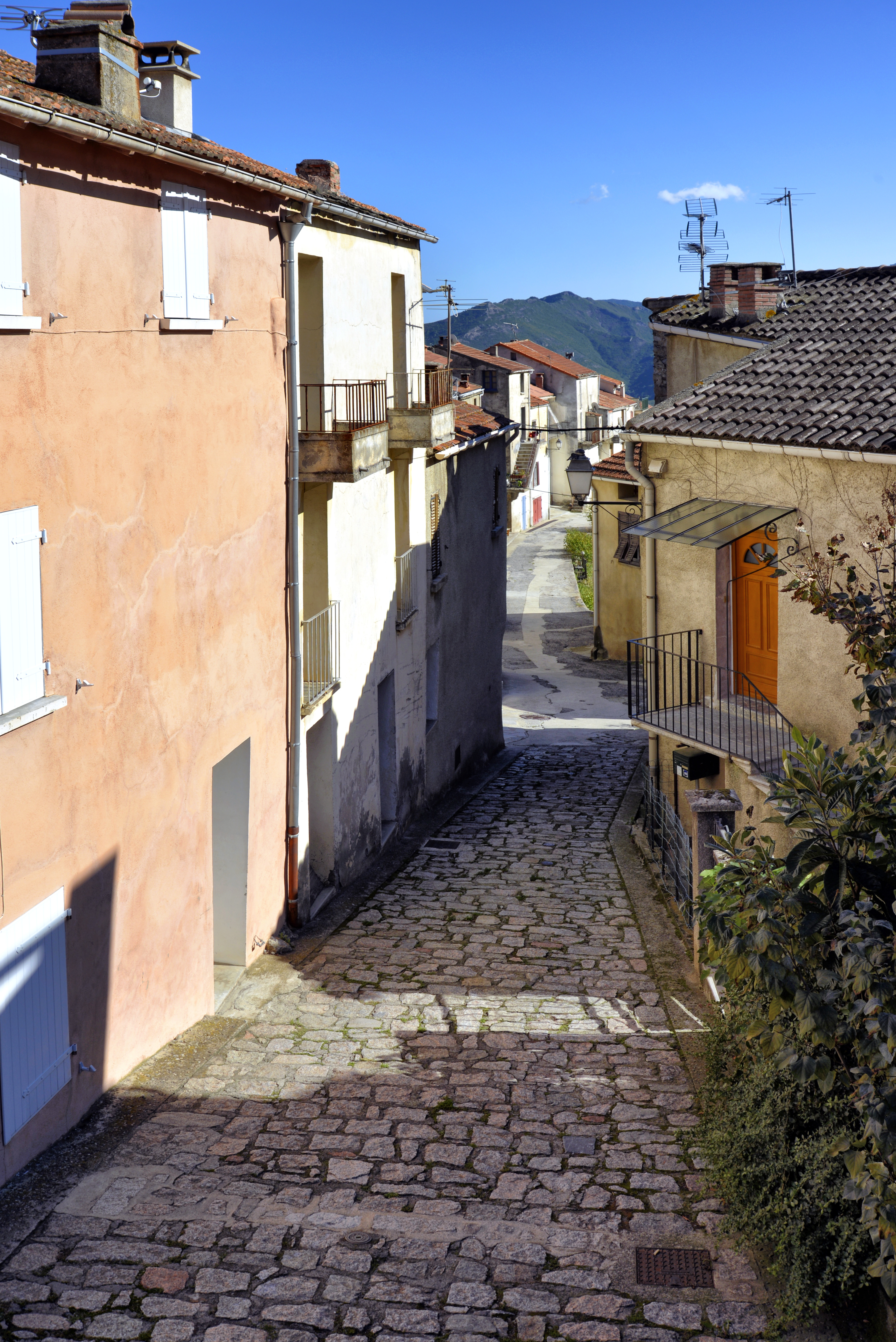 Venaco, Centre Corse - La ruelle de la façade méridionale du village de Lugo